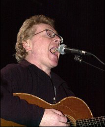 Paul Brady.